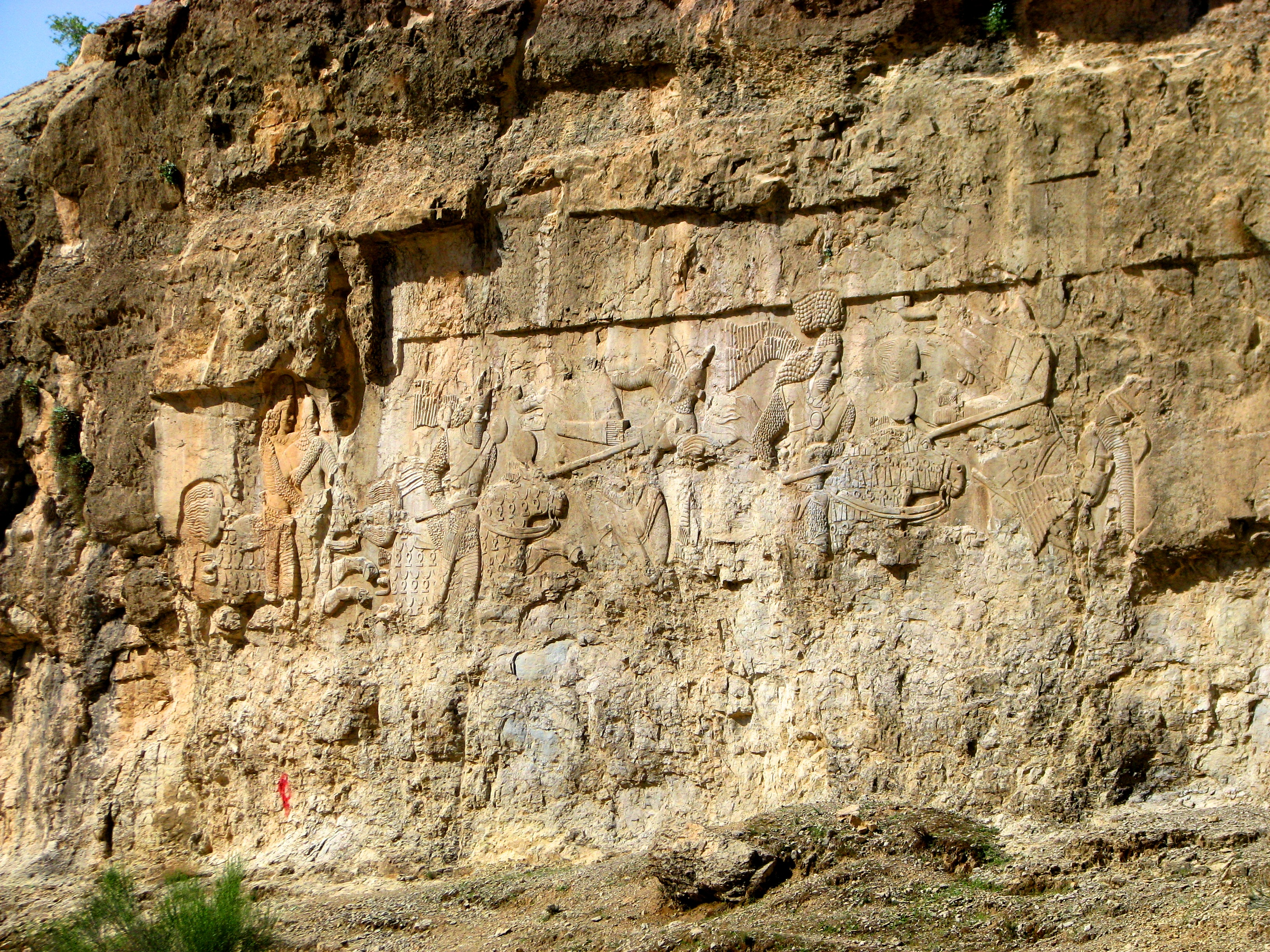 یادمان پیروزی اردشیر بابکان بر واپسین شاهنشاه اشکانی، اردوان پنجم